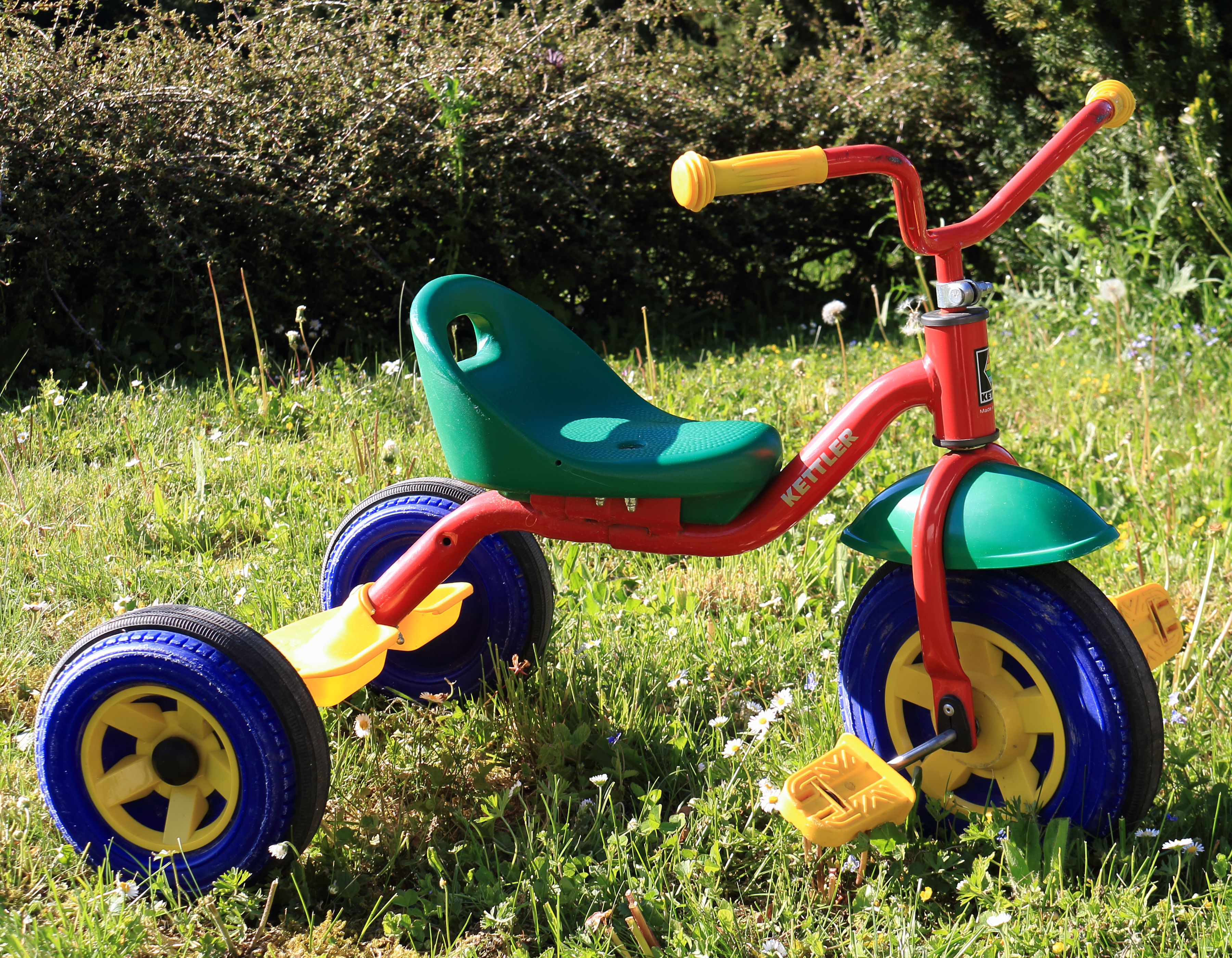 Kinderdreirad